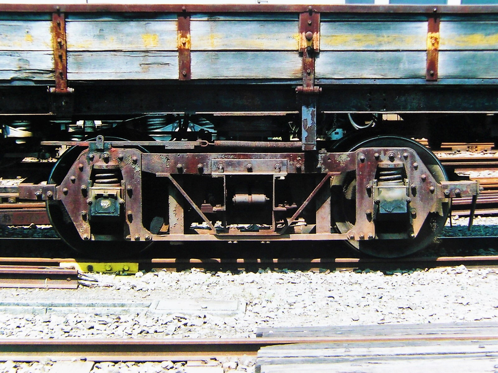 高松琴平電気鉄道デカ1形台車